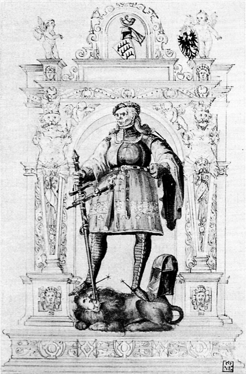 Entwurf zum Denkmal Ulrich des Stifters(Federzeichnungaquareliert)